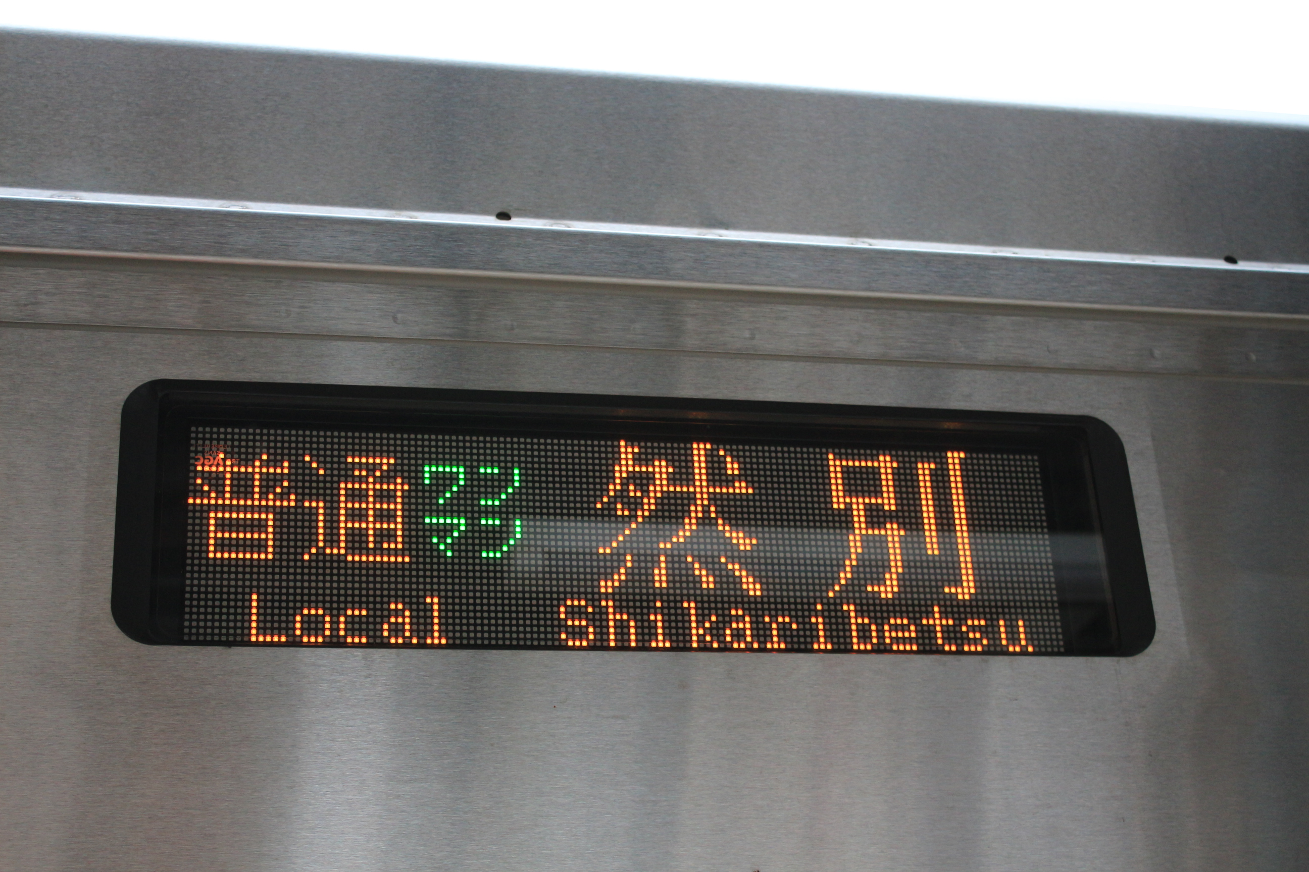 JR北海道 H100形 側面表示